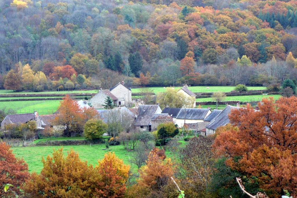 Hameau de Crottefou à Marigny-l'Église (Nièvre, France)